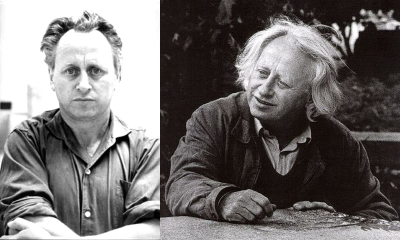 Karl Prantl als junger Mann und im Alter